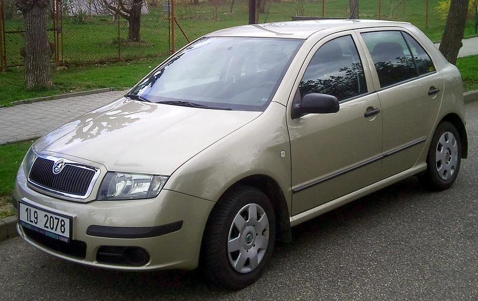 Skoda Fabia Limousine